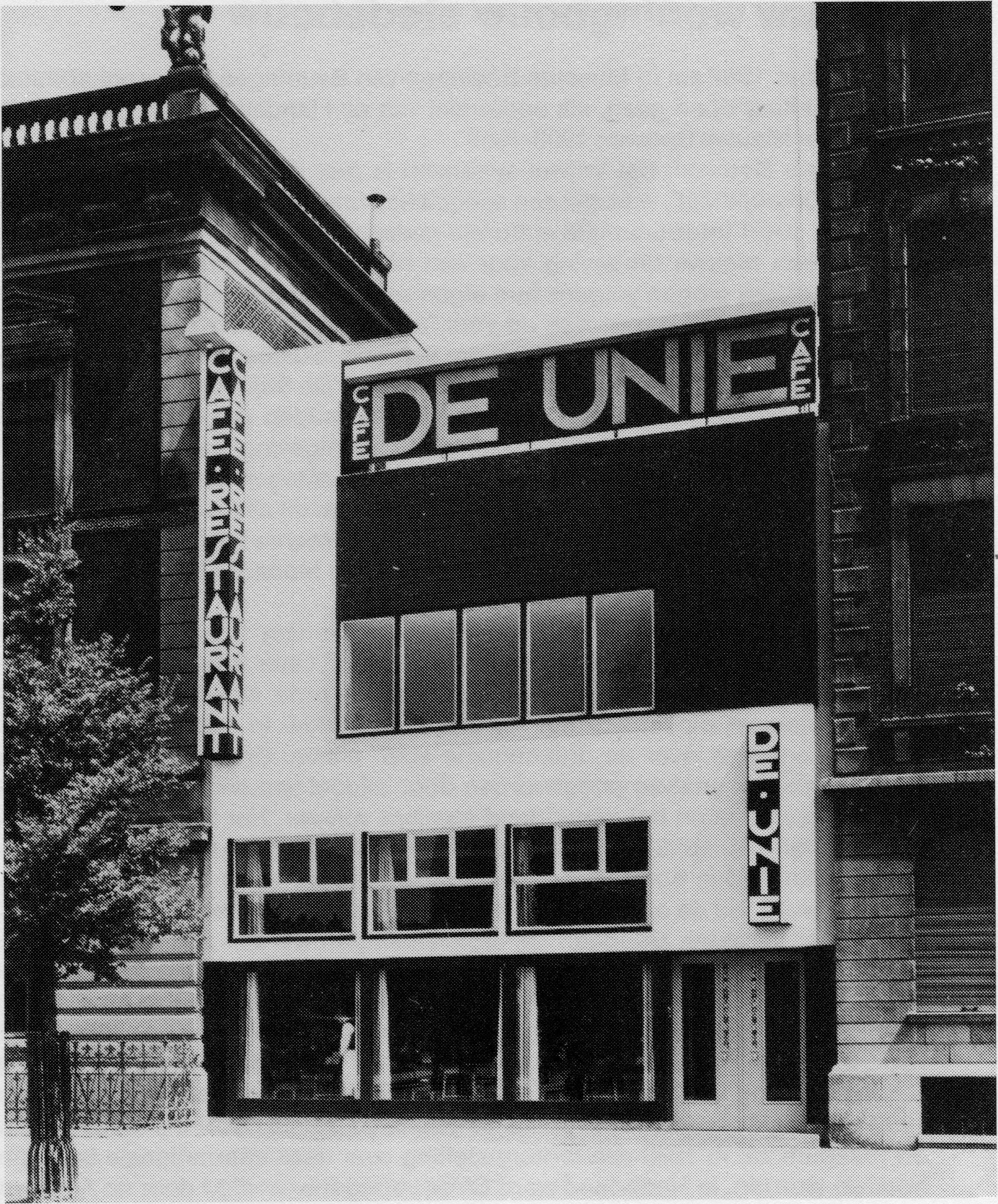 Café De Unie, fotograaf onbekend